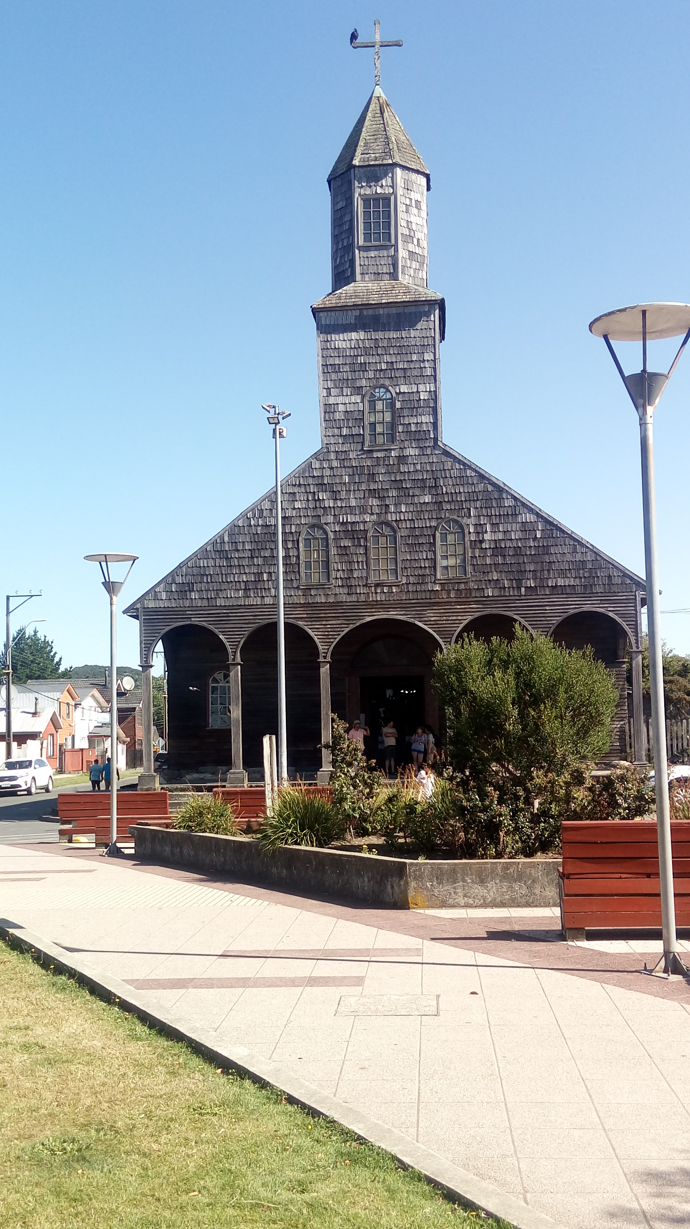 Vista desde la Plaza de Armas. Achao